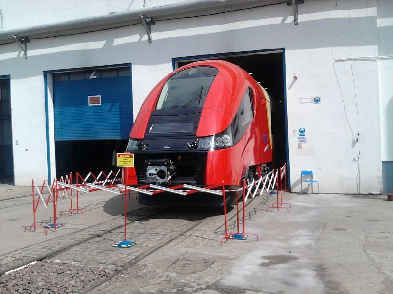 Elektryczny zespół trakcyjny Pesa Elf 27WE-001 dla SKM Warszawa stoi w hali produkcyjnej Pesy Bydgoszcz.